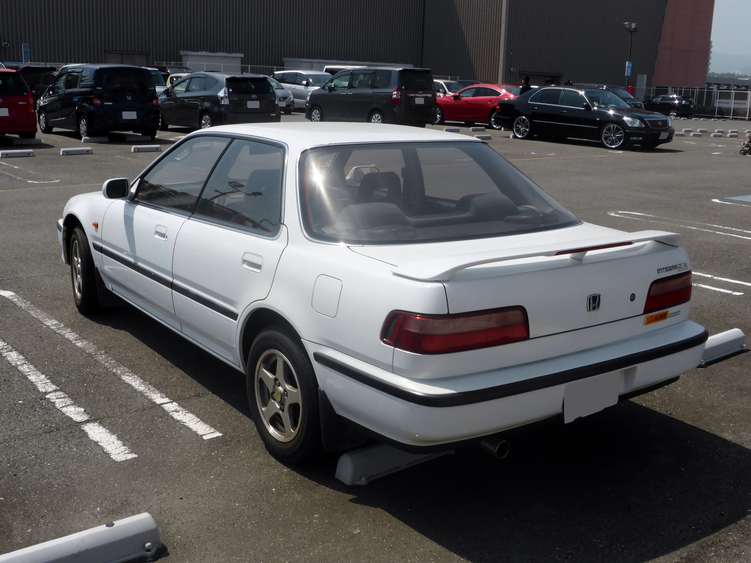 E-DA7型ホンダ・インテグラZXエクストラをリアから撮影。